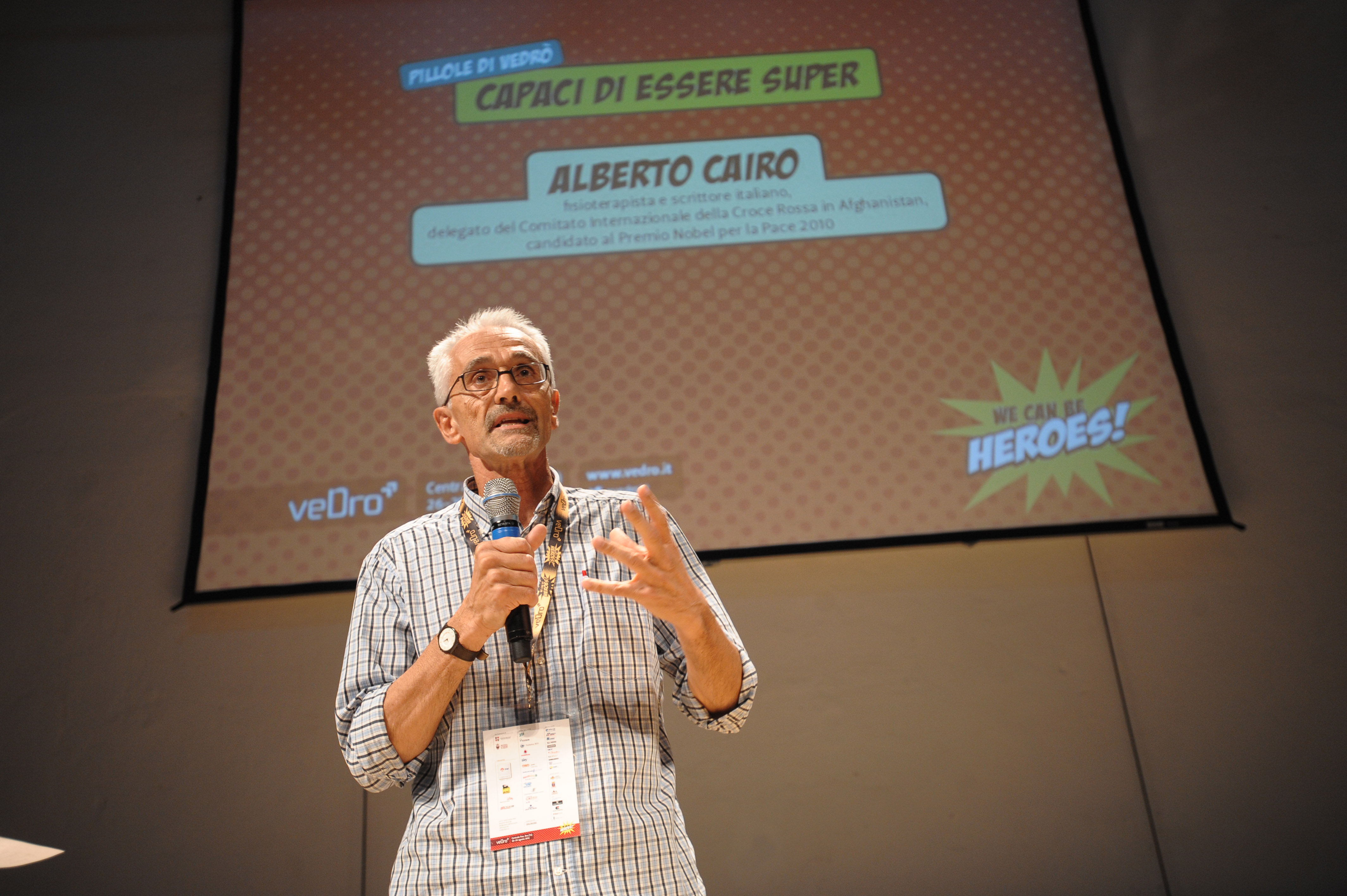 Alberto Cairo a veDrò 2012.